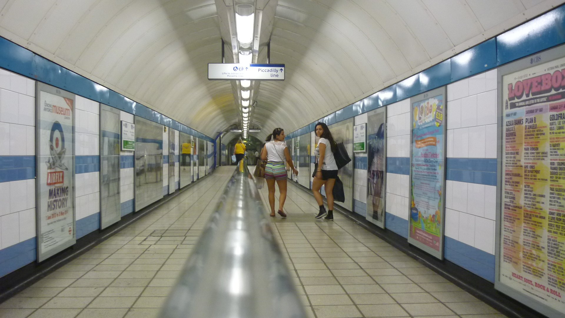 Mayfair, London, UK